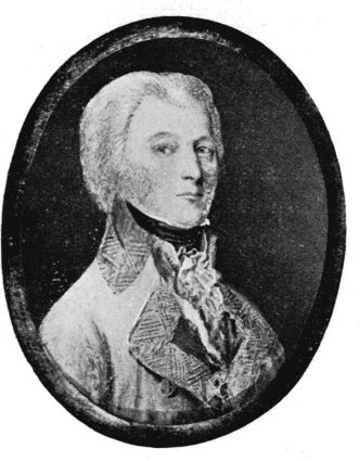 Austrian general Paul Kray de Krajova et Topolya